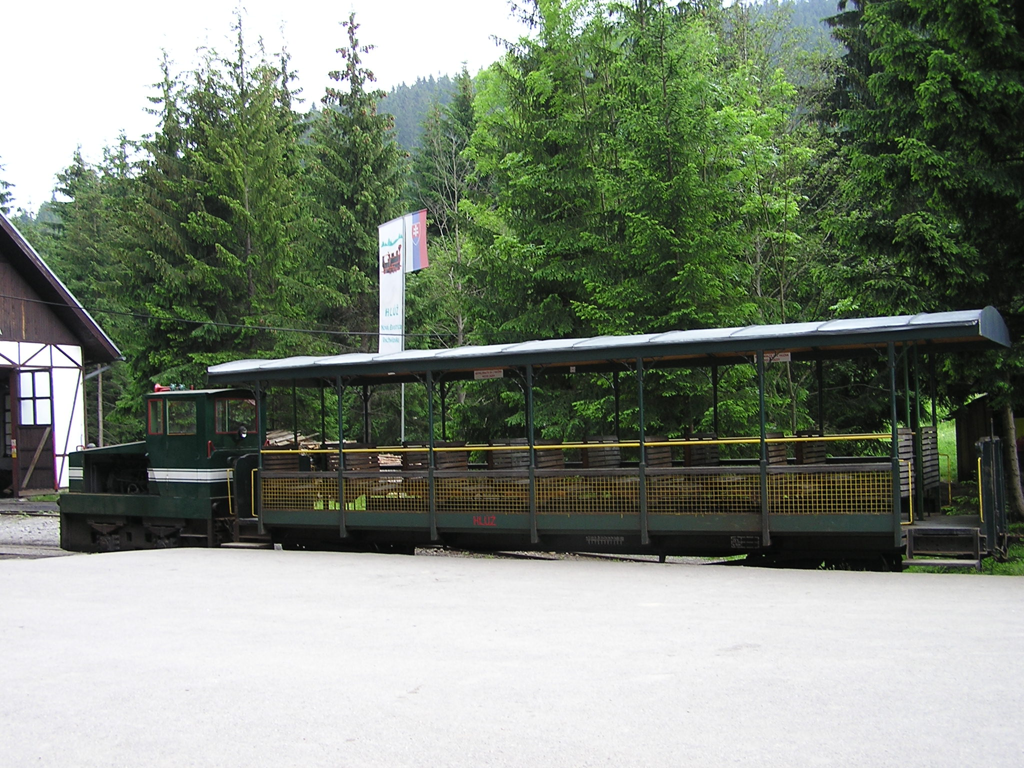 Museum Vychylovka, Slovakia